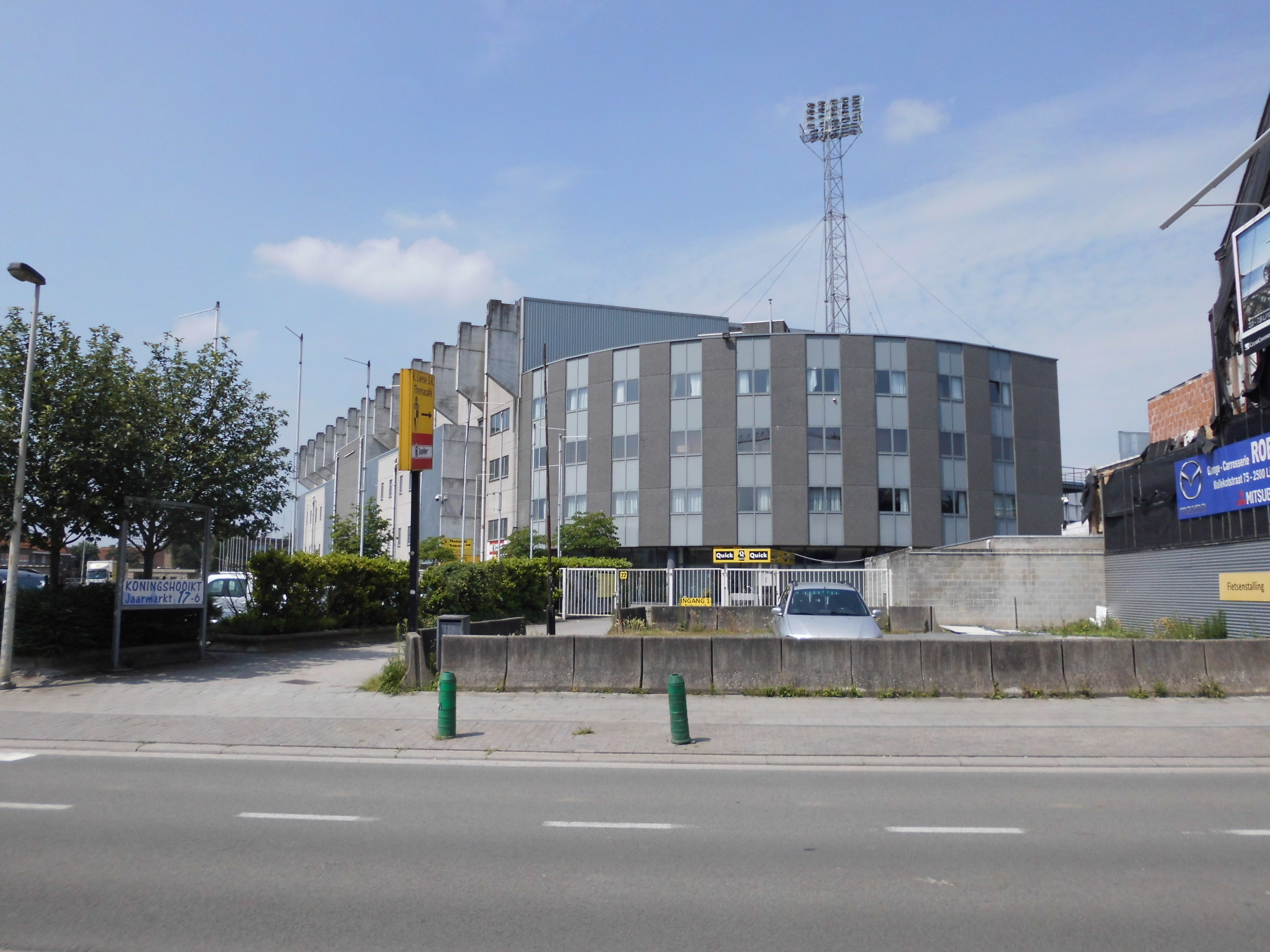 Stadion Lierse anno 2018